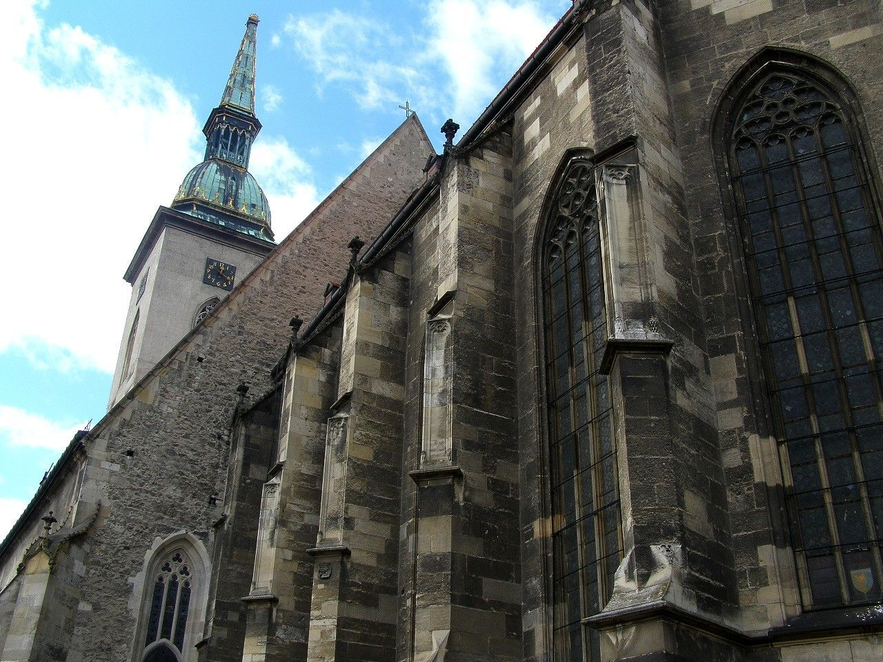 Oporný systém presbytéria katedrály